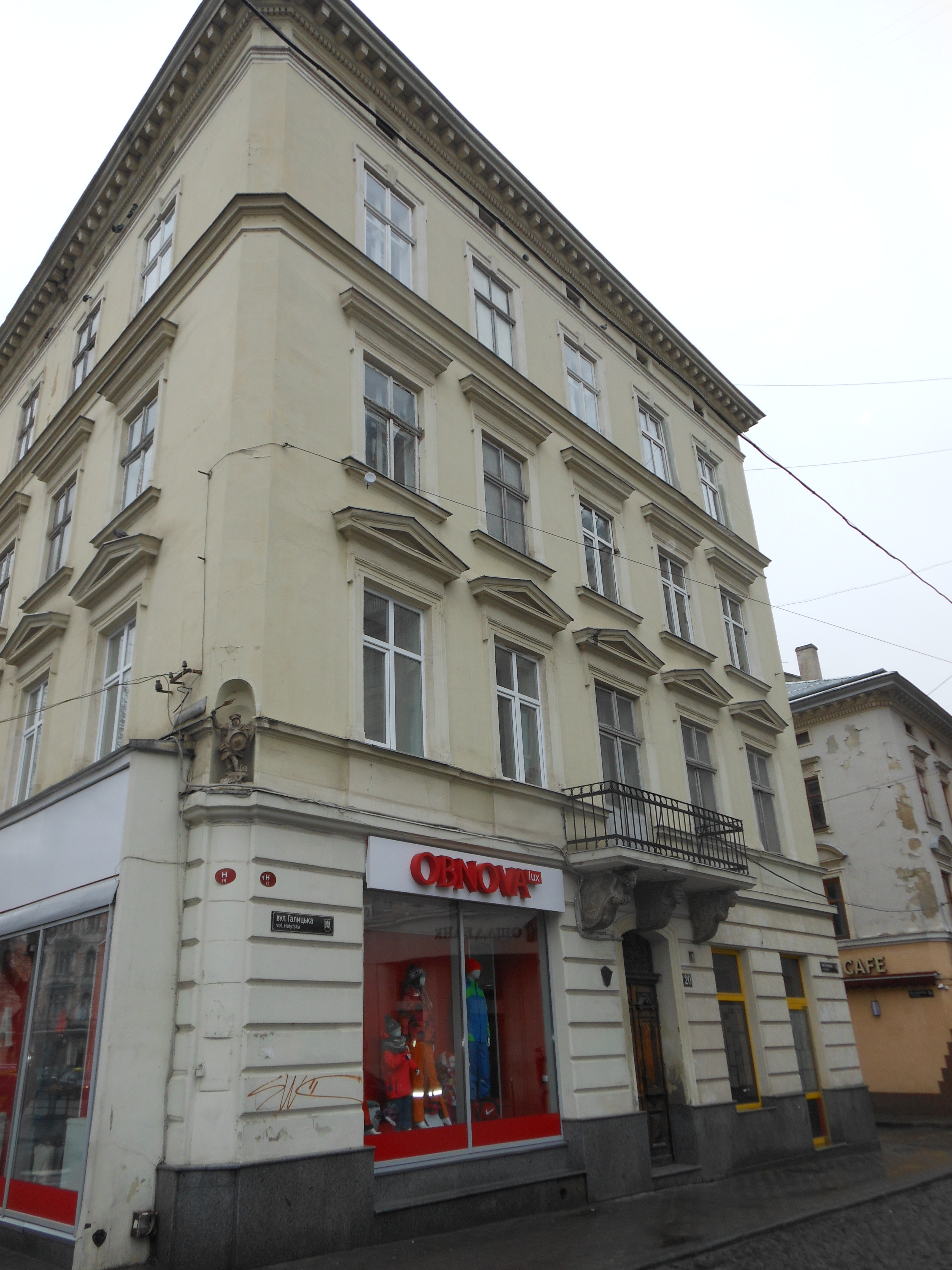 Житловий будинок, Львів, Галицька вул., 20